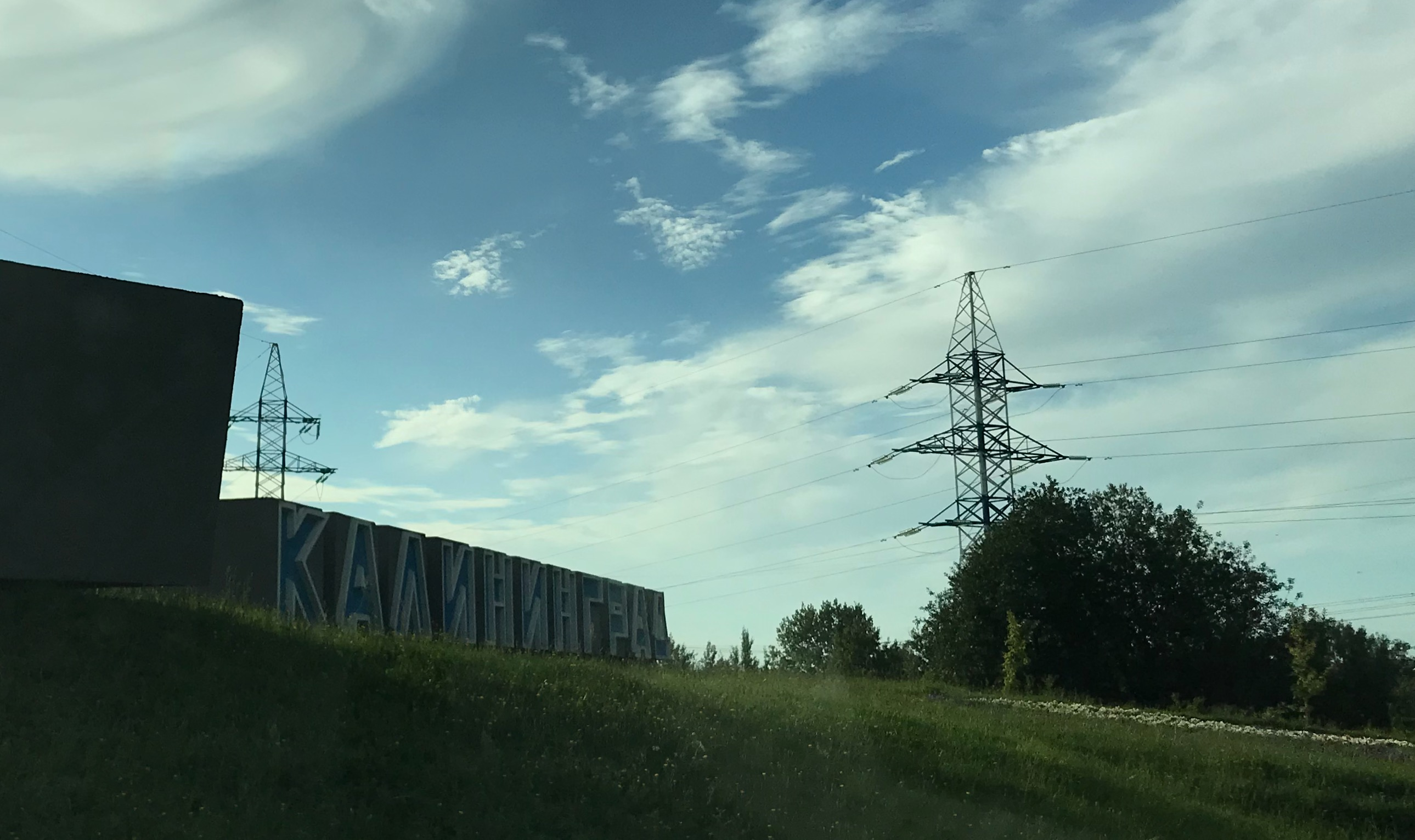 Въезд в Калининград